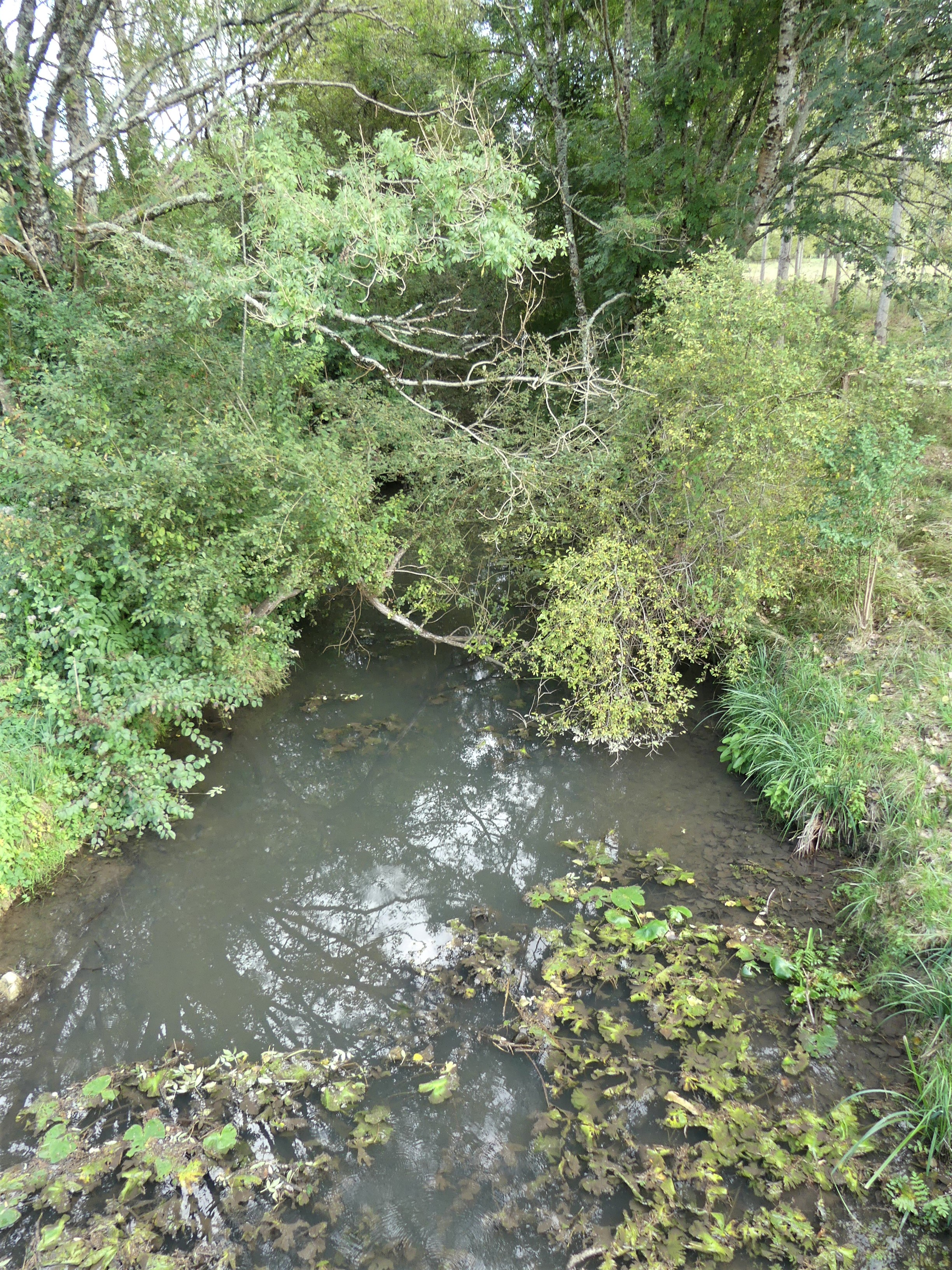 La Nizonne au pont du Râteau, en limite des communes déléguées de Beaussac (à gauche) et de Puyrenier (à droite), commune nouvelle de Mareuil en Périgord, Dordogne, France. Vue prise en direction de l'amont.